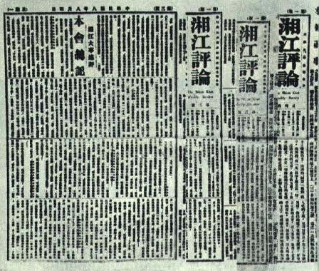 1965-7 1965年 湘江评论